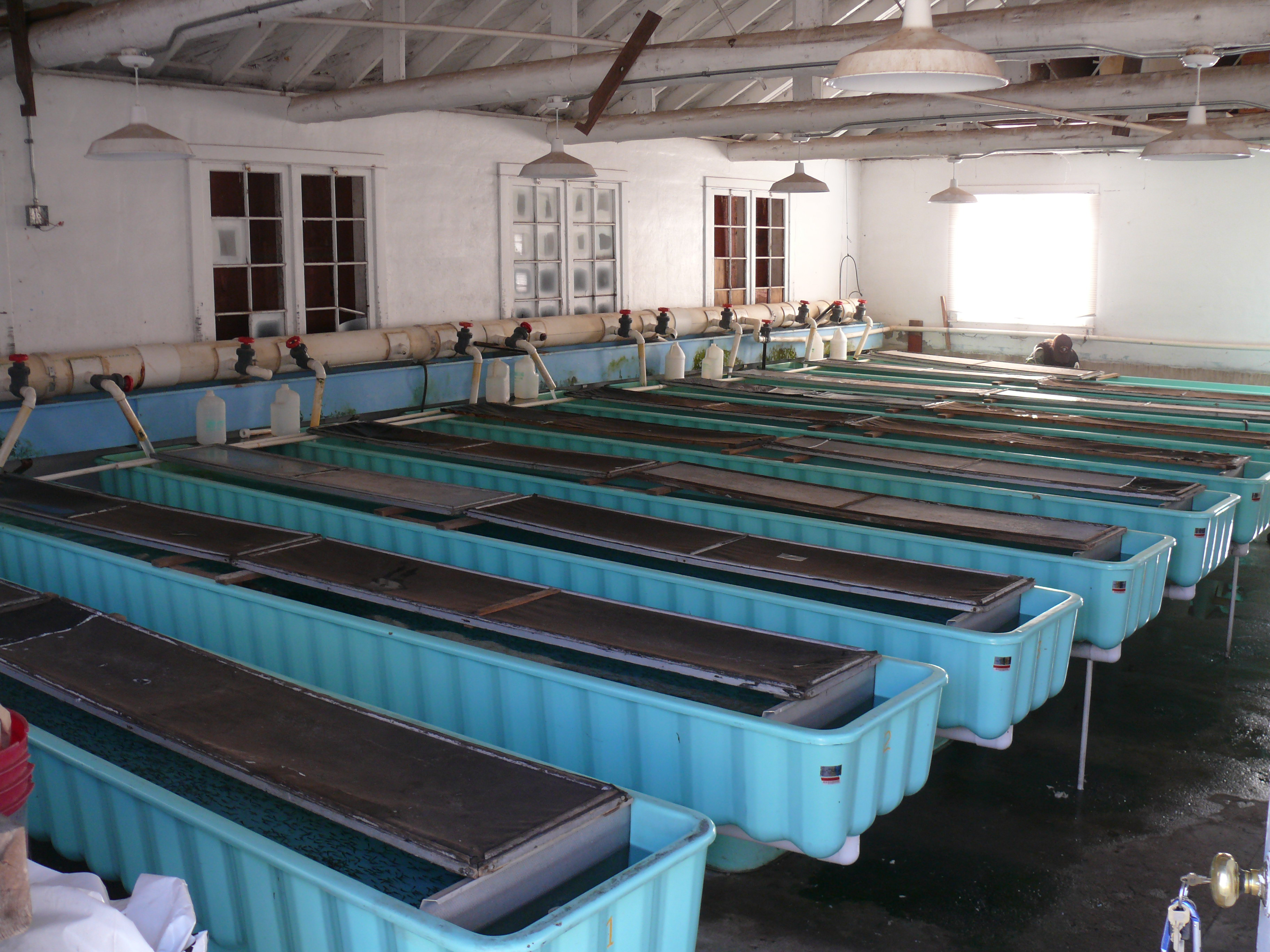 Élevage de poissons à Glenwood (Nouveau-Mexique, États-Unis).